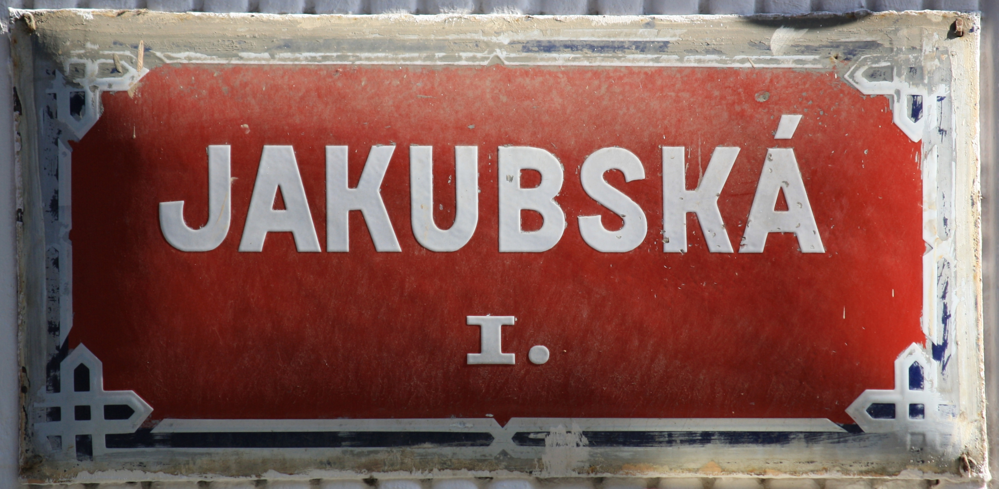 Praha, Staré Město - Jakubská, stará cedule